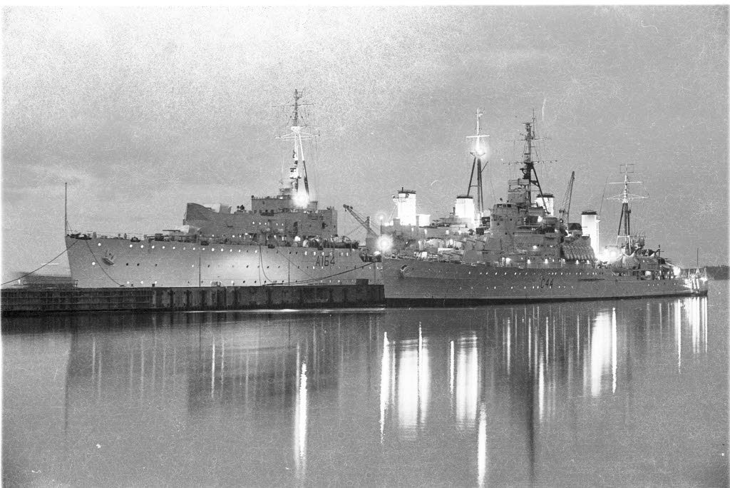 U-Boot-Versorgungsschiff ADAMANT (brit.) und der Leichte Kreuzer JAMAICA (brit.) bei Nacht.